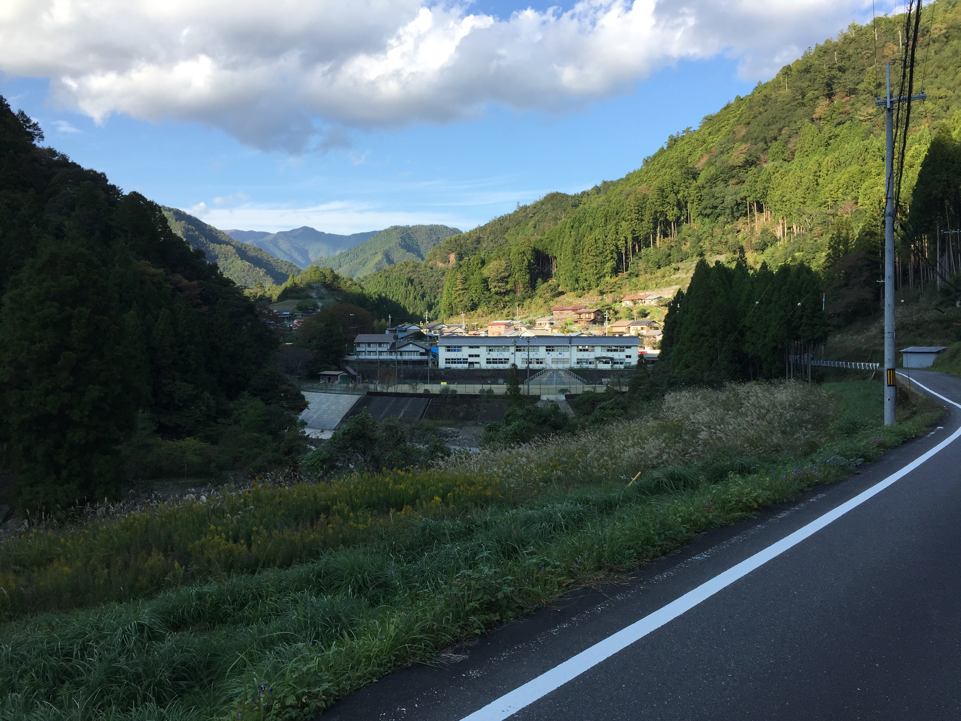 西川第一小学校遠景